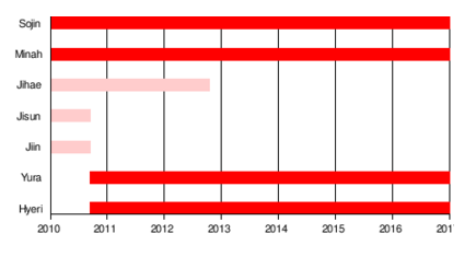 Üye zaman çizelgesi